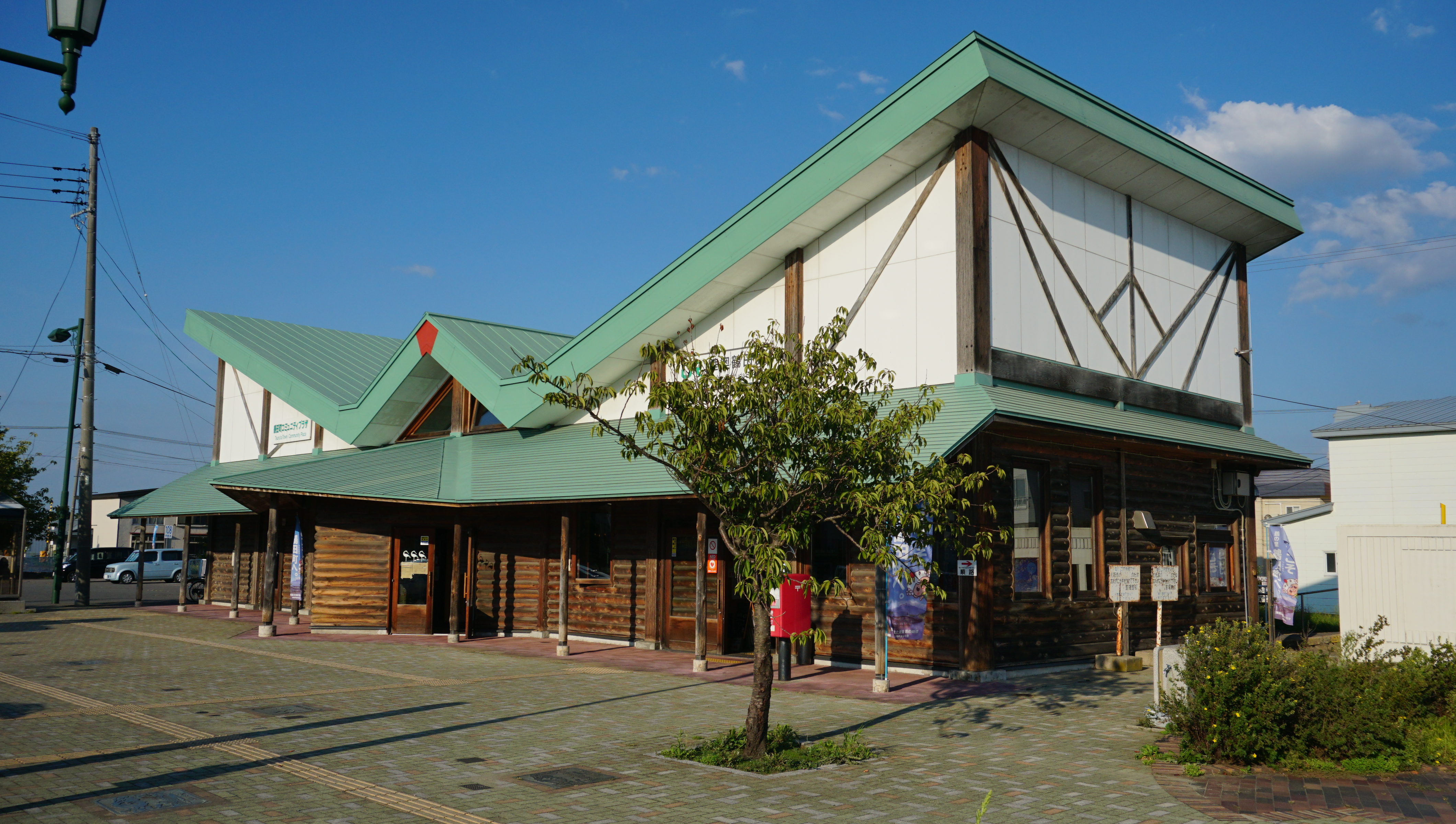 五能線 陸奥鶴田駅（青森県北津軽郡鶴田町）